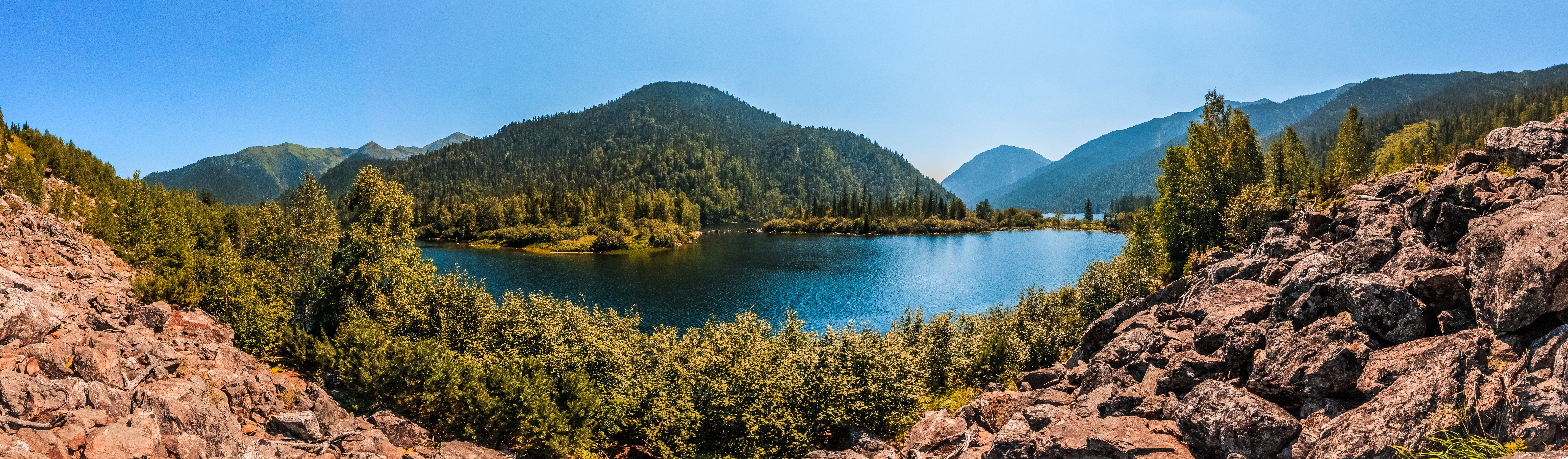 Озеро Соболиха: район, Бурятия This image is related to the protected area of Russia number 0310232